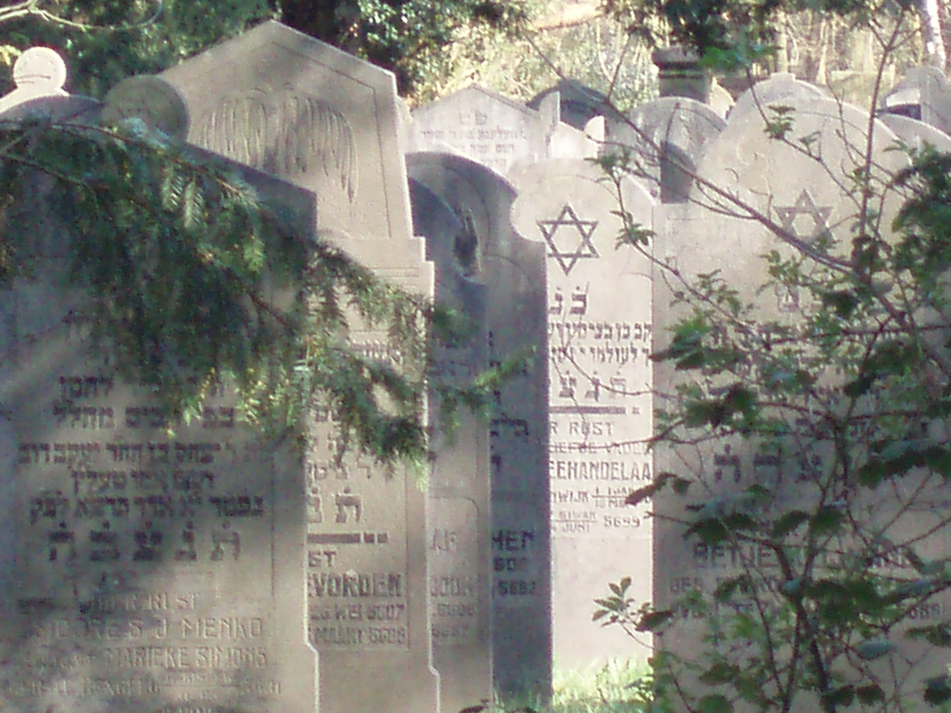 De Joodse begraafplaats te Zwolle aan de Kuyerhuislaan in Herfte.